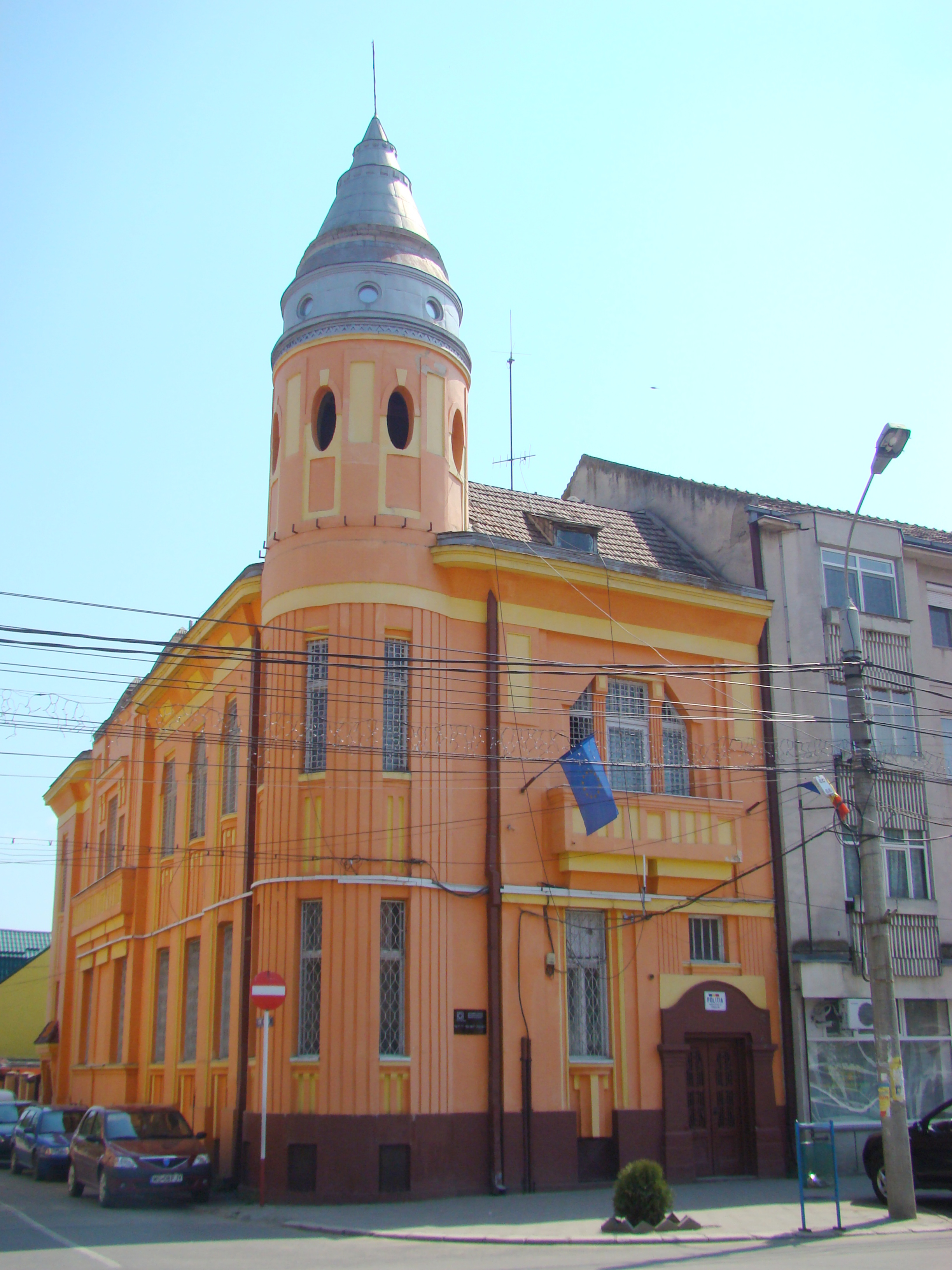 Poliția orașului Târnăveni, fostul sediu al băncii „Albina”